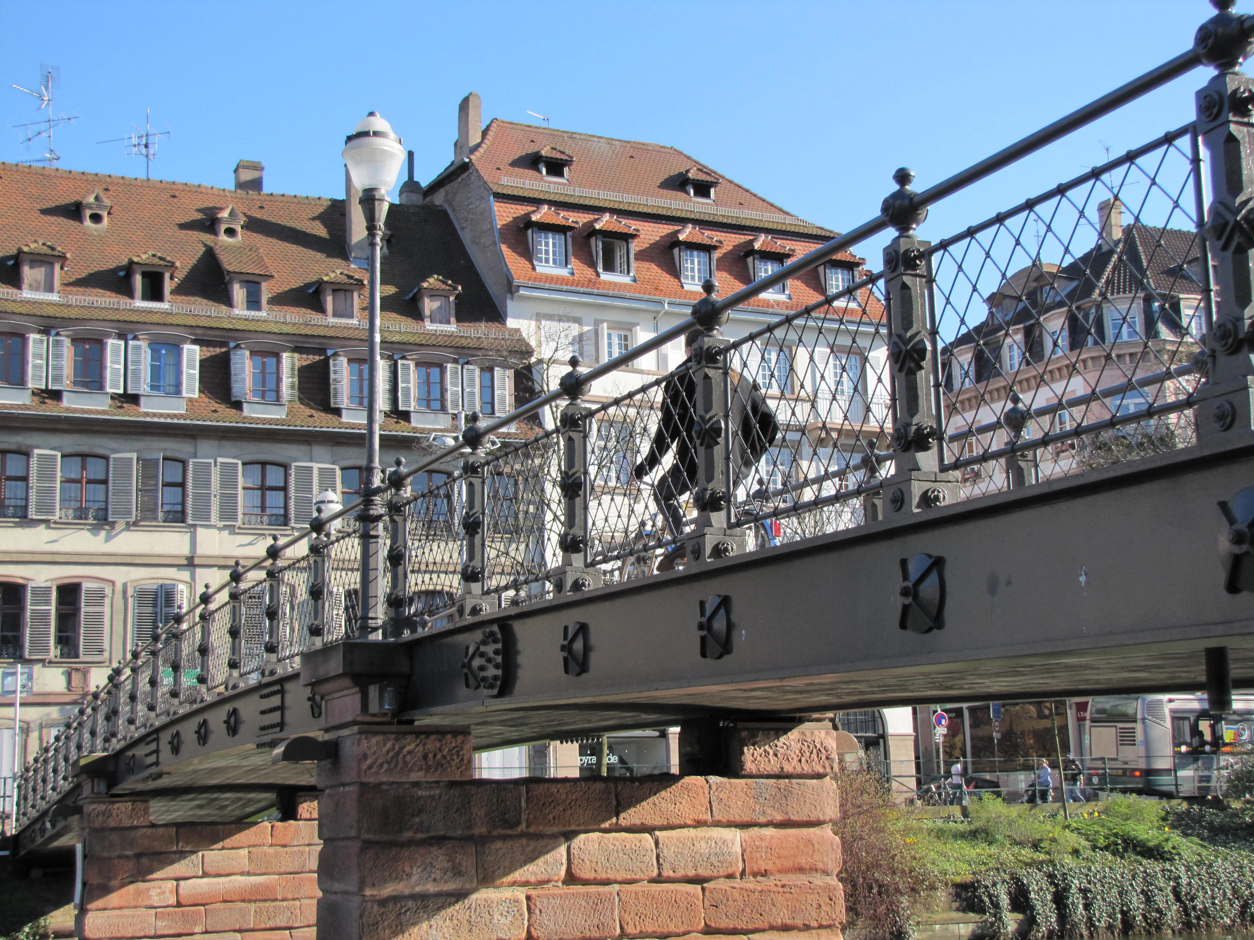 Alsace, Bas-Rhin, Strasbourg, Passerelle de l'Abreuvoir.